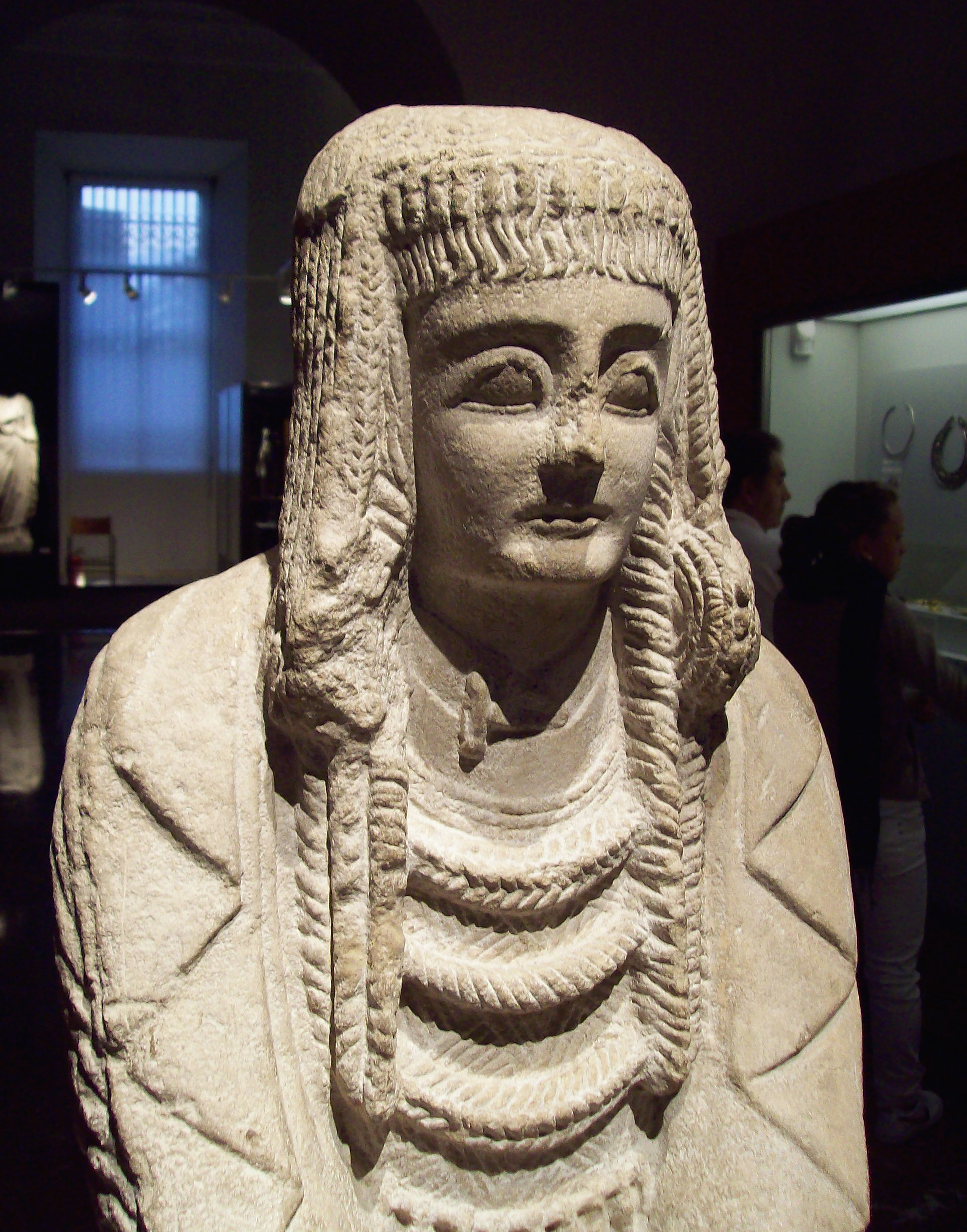 Iberian sculpture.